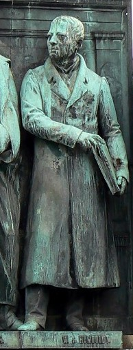 Friedrich Wilhelm III.-Reiterstandbild auf dem Kölner Heumarkt. Detail: Statue des Wilhelm von Humboldt.